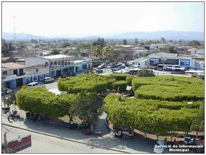 Parque Central